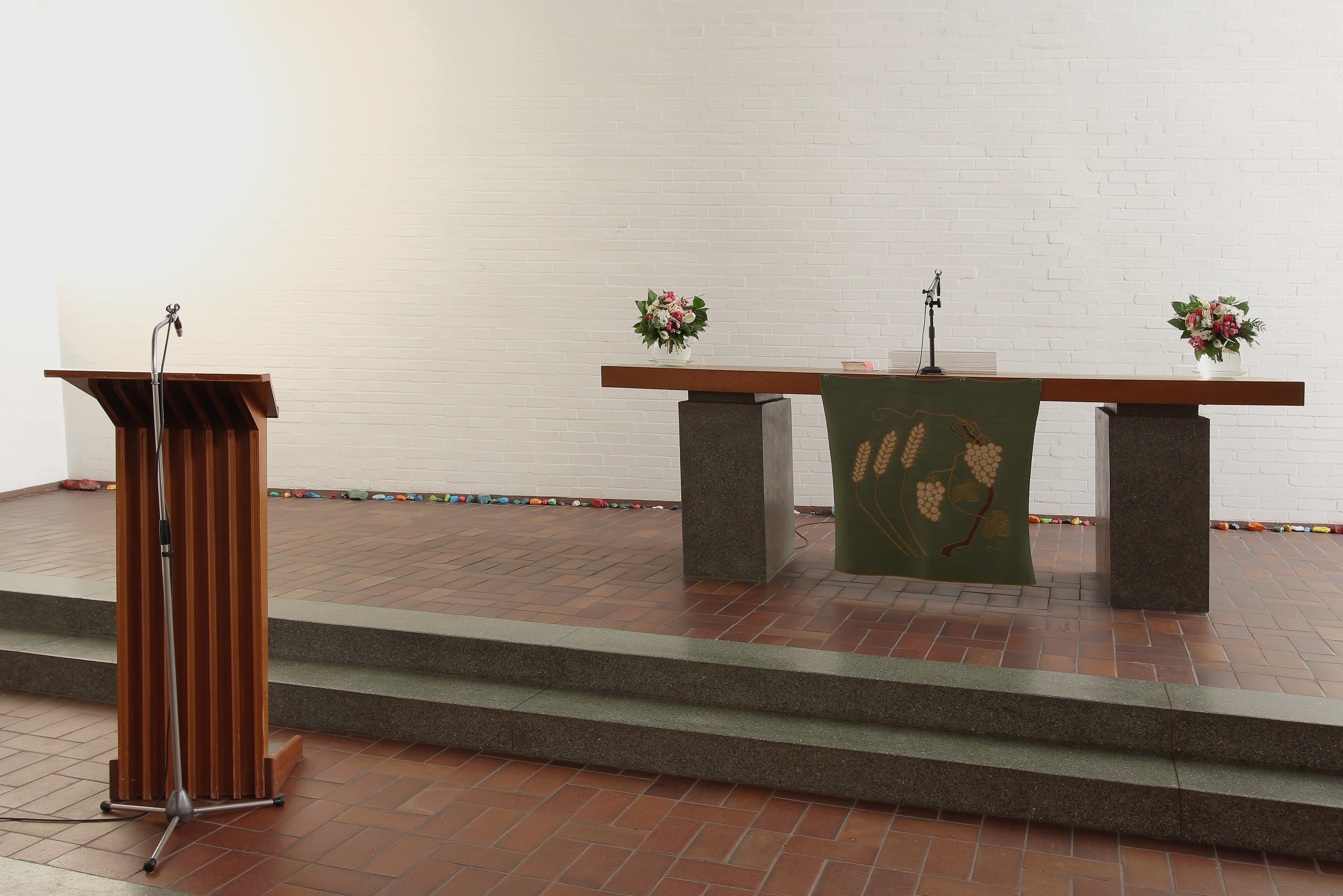 Hamburg-Harburg, St. Johannis Kirche, Altar This is a photograph of an architectural monument.